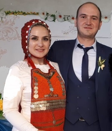 Башкирская свадьба. Невеста в кашмау- головном уборе для замужней женщины